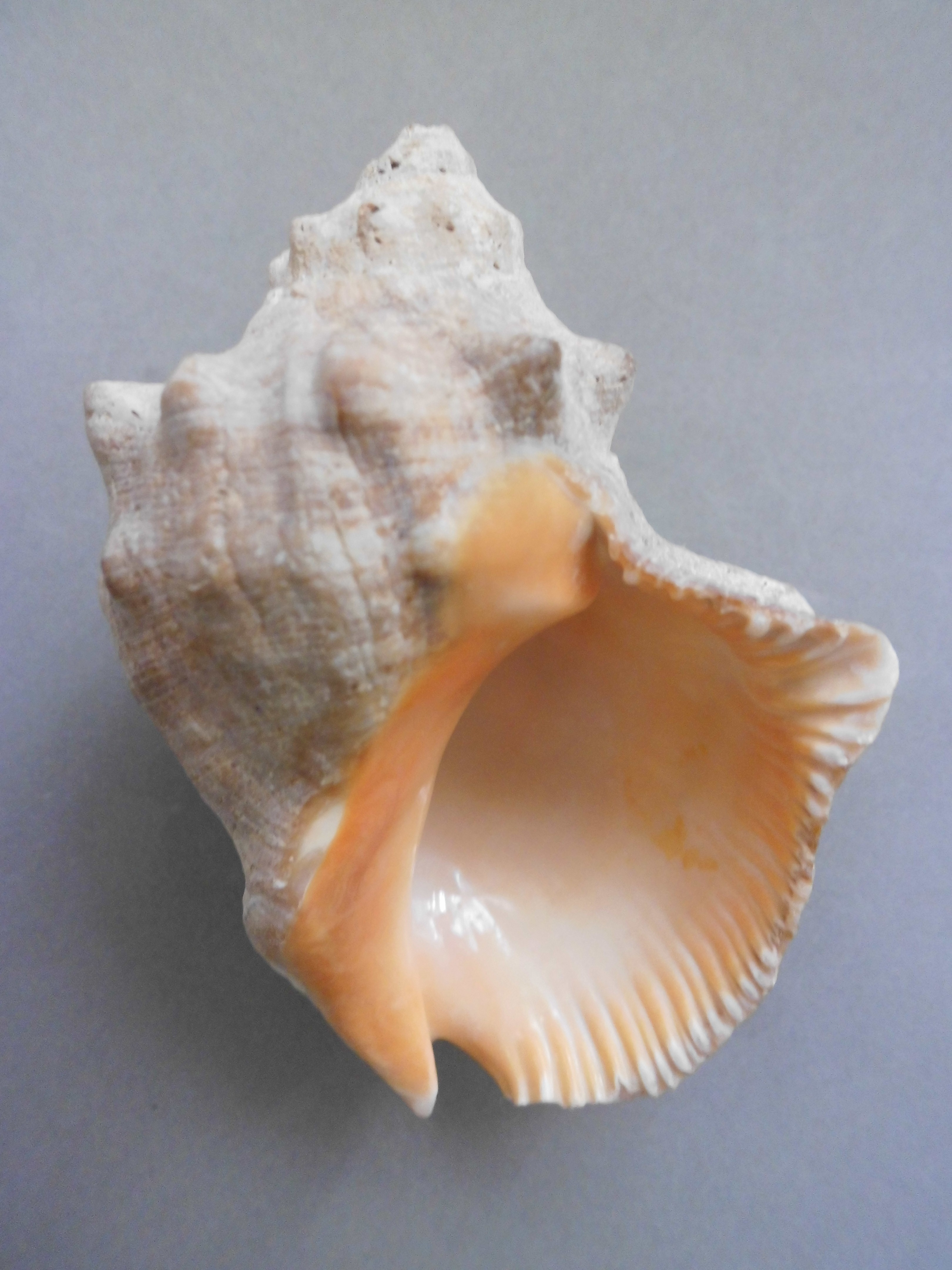 Stramonita rustica (Lamarck, 1822) colectado en la Isla La Orchila, Dependencias Federales - Venezuela